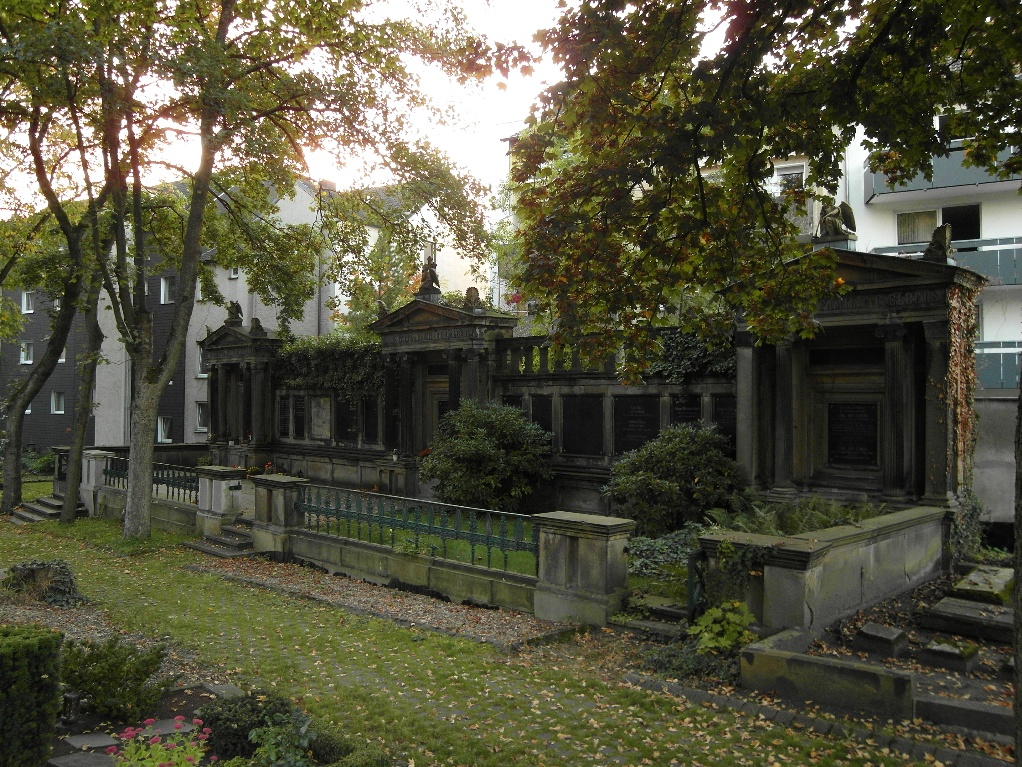 Friedhof Buschey, Grabmal der Fam. Elbers; Grünstraße, Hagen This is a photograph of an architectural monument.